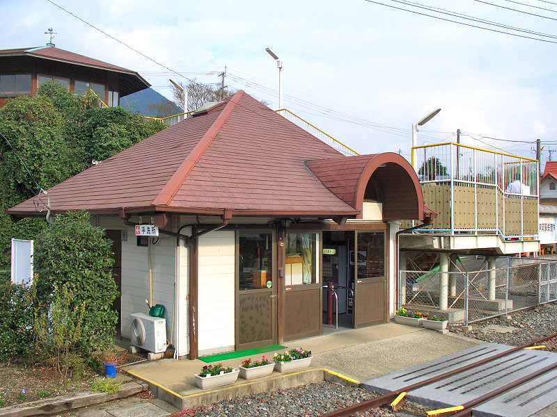 JR豊肥本線立野駅 駅舎 JR駅構内より撮影。 左上の建物は駅前の土産物店、右手の階段が駅前に出る階段、右奥が南阿蘇鉄道のホーム。 駅舎は外から撮影するのが基本だとは思いますが、当駅は外からの撮影だと駅舎全体の撮影が不可能ですので構内からの撮影としました。 撮影者/著者/著作権保有者 : MK Products (本人がアップロード) 撮影日 : 2006/11/29 立野駅_用にアップロードした画像です。良い画像があれば別の画像に変えてください。